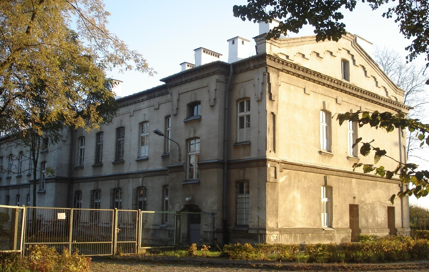 Garnizon Przasnysz, 2010 r.